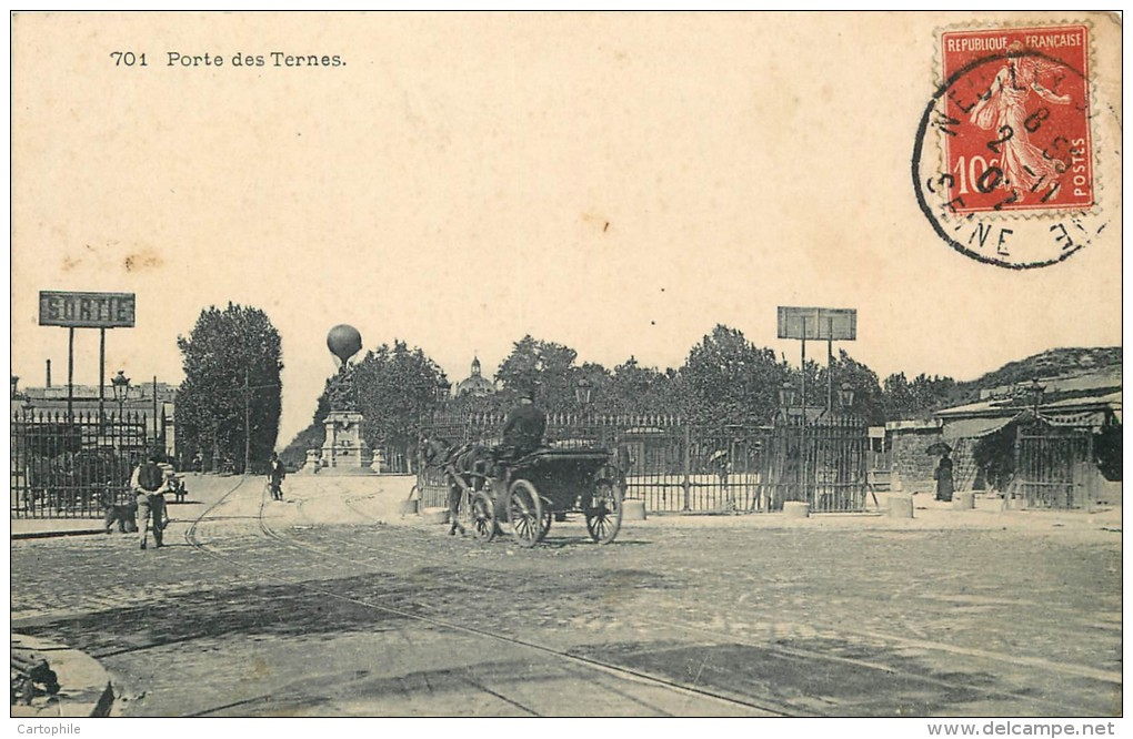 En arrière-plan une œuvre de Bartholdi, le monument du ballon de la porte des ternes, vers 1910